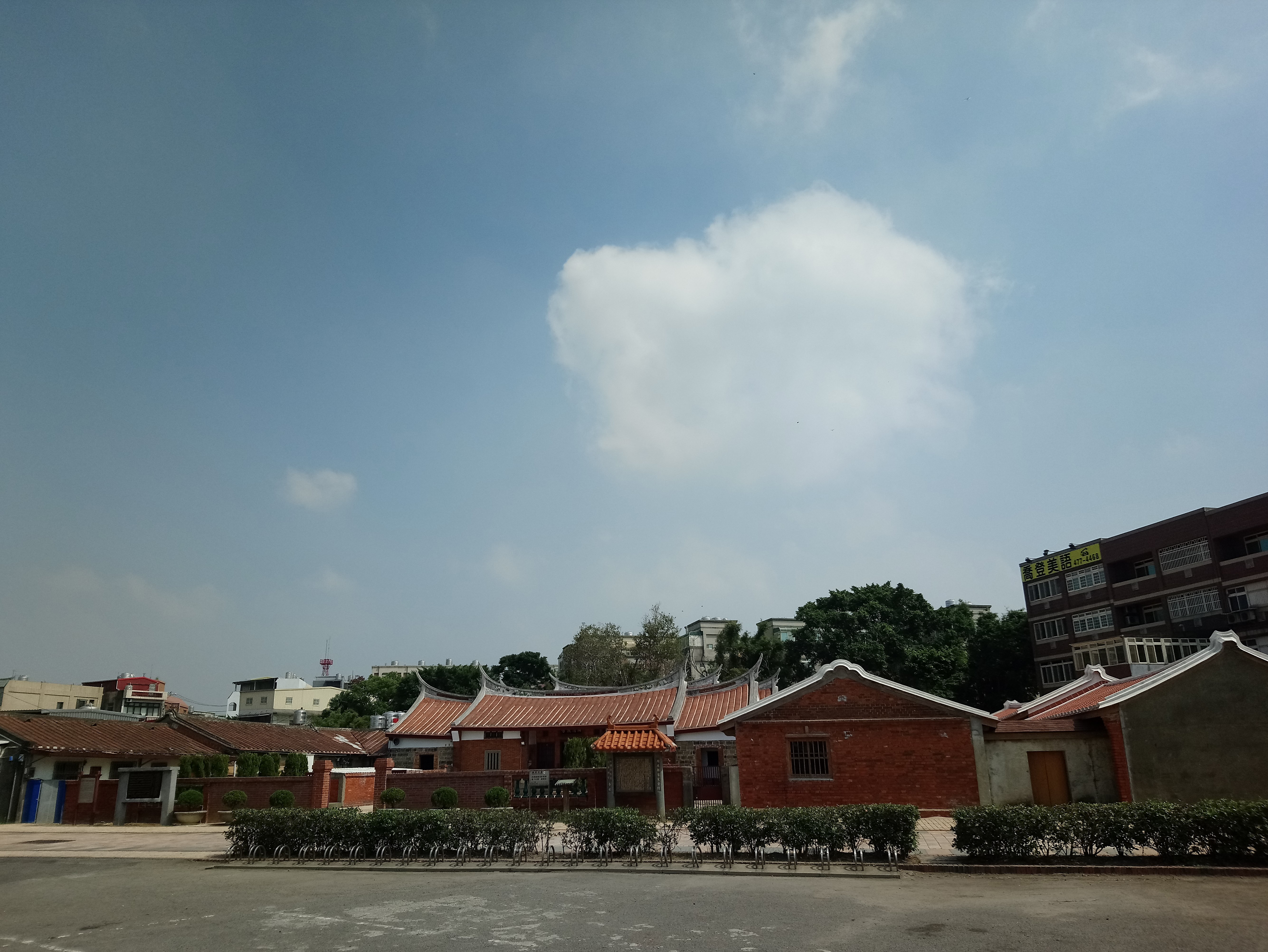 新屋范姜祖堂遠景,桃園市新屋區新屋次分區新生里